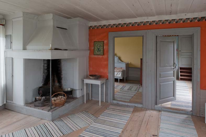 Hudiksvall Hillsta 6:1. Sängstugebyggnaden, interiör i empire med målad takbård och grå snickerier. Gården består av manbyggnad, sängstugebyggning och bryggstuga ihopbyggda med ladugård, samt en stor loge. De bildar en tät fyrkant runt ett gårdstun. Utanför gårdsfyrkanten ligger några mindre uthus; småfähus, härbre, vagnslider, loge, sädesbastu och vedbod. Hälsingegårdar. Motiv: Hudiksvall Hillsta 6:1 Nyckelord: Byggnadsminnen, Riksintressen Kategori: Hembygdsgård, Jordbruksegnahem Hudiksvall Hillsta 6:1. Sängstugebyggnaden, interiör i empire med målad takbård och grå snickerier. Gården består av manbyggnad, sängstugebyggning och bryggstuga ihopbyggda med ladugård, samt en stor loge. De bildar en tät fyrkant runt ett gårdstun. Utanför gårdsfyrkanten ligger några mindre uthus; småfähus, härbre, vagnslider, loge, sädesbastu och vedbod. Hälsingegårdar. Hudiksvall Hillsta 6:1.